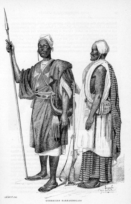 Guerriers sarrakholais (illustration de Côte occidentale d'Afrique, 1890 du Colonel Frey) [Pl. en reg. p.88 :] [Cote : Réserve A 200 386]